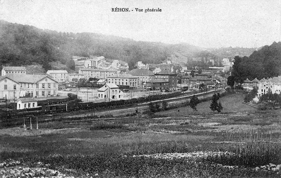 Les installations ferroviaires de Réhon. La halte voyageurs est au second plan près des arbres sur la droite de l'image. Au centre la voie et les installations de l'usine de La Providence.